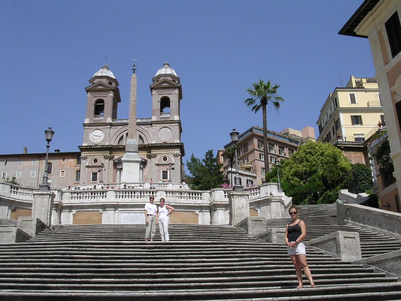 Scalinata trinità dei monti, Roma, Italia